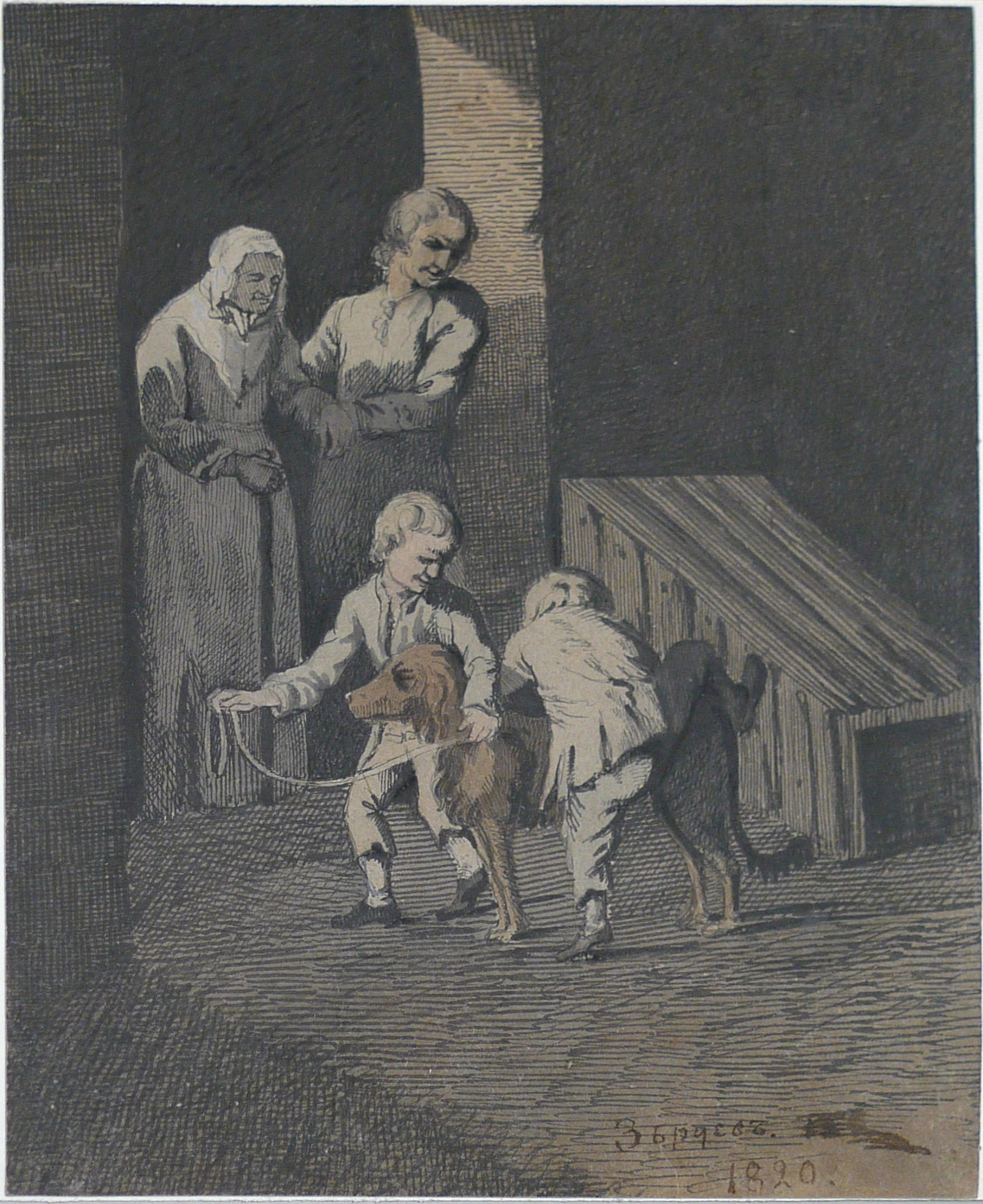 рисунок А.А. Збруева, 1820г. Государственная Третьяковская галерея